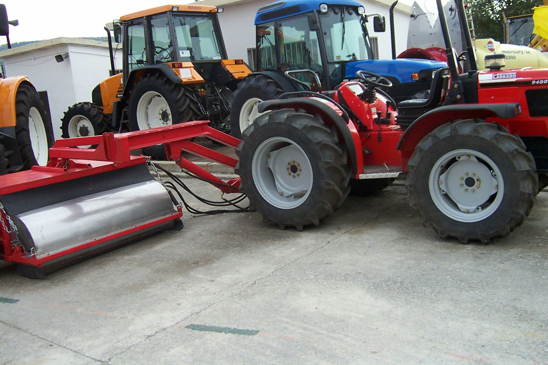 Imagen de Tractores en Alcalá la Real, Jaén.